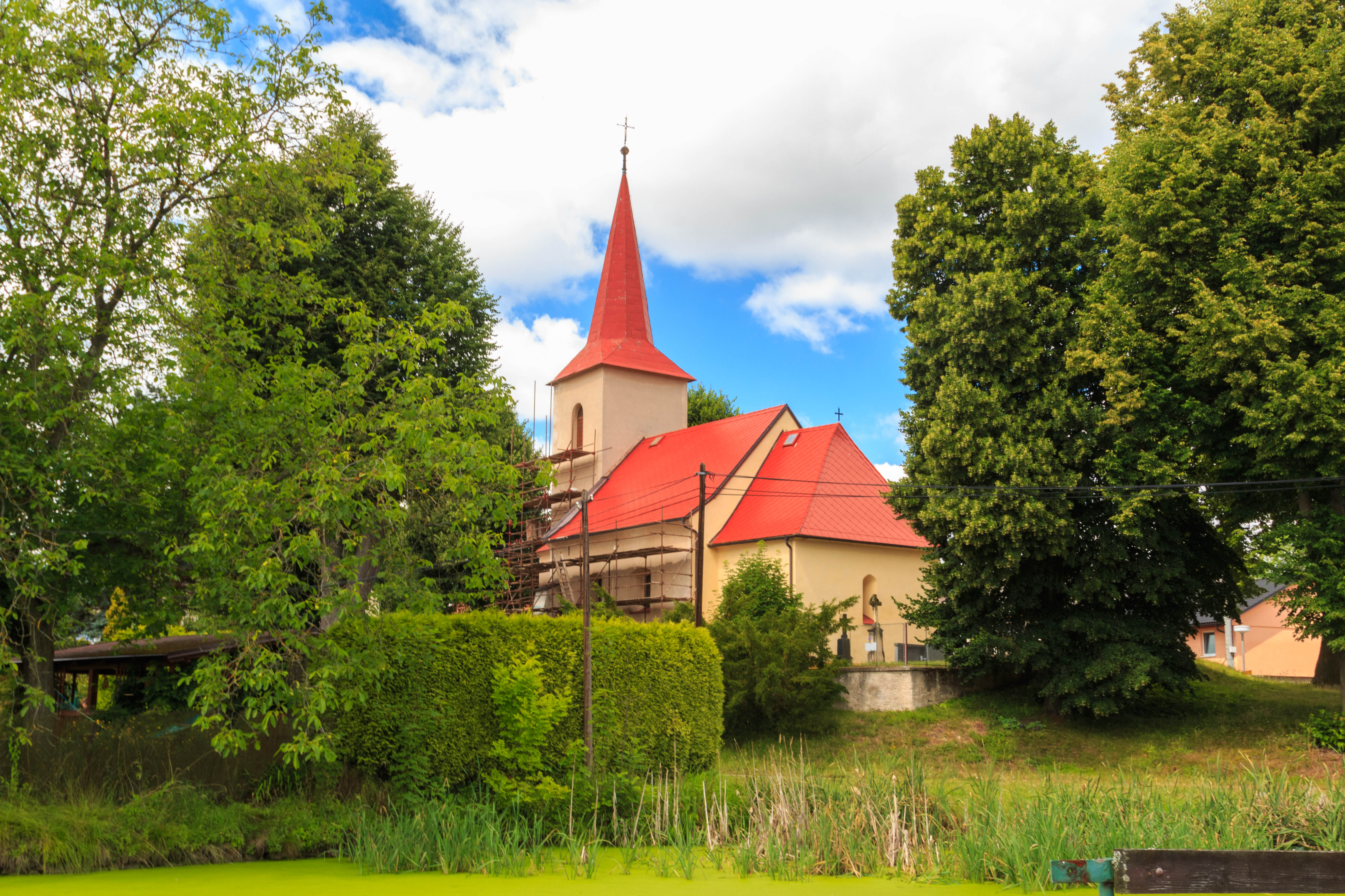 Kostel Navštívení Panny Marie, Třebětín.